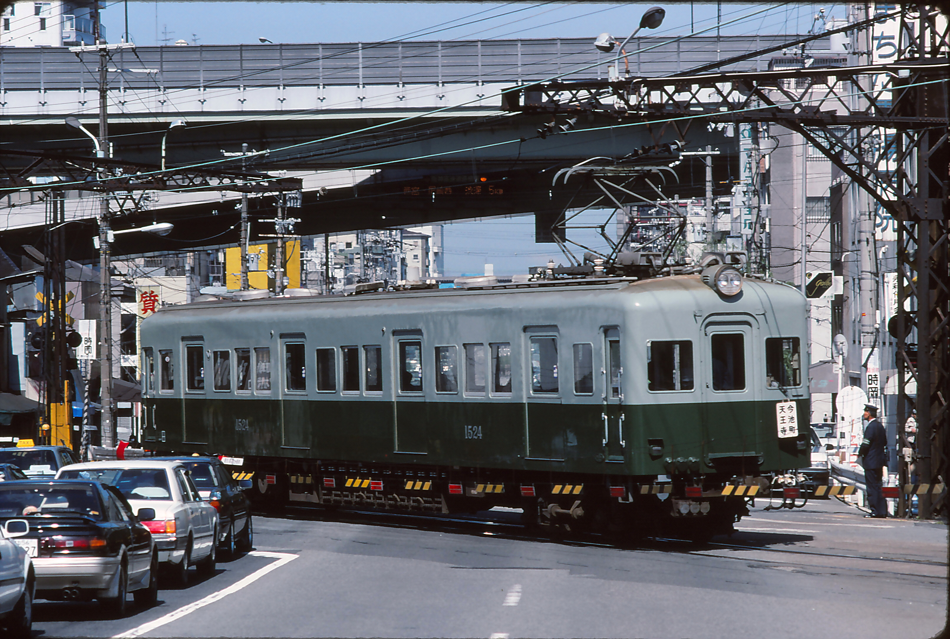 南海天王寺支線跡-00